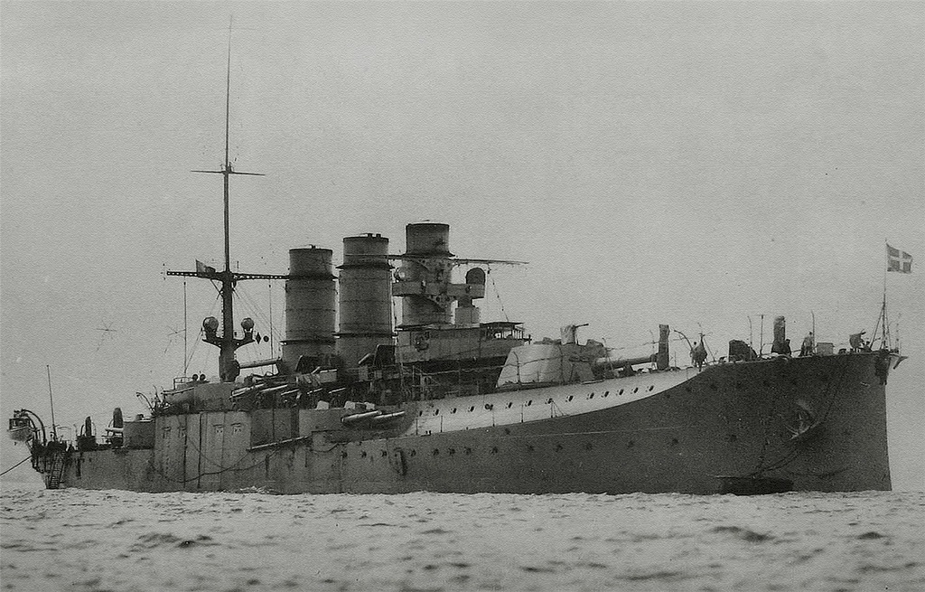 La corazzata Roma della Classe Regina Elena alla fonda